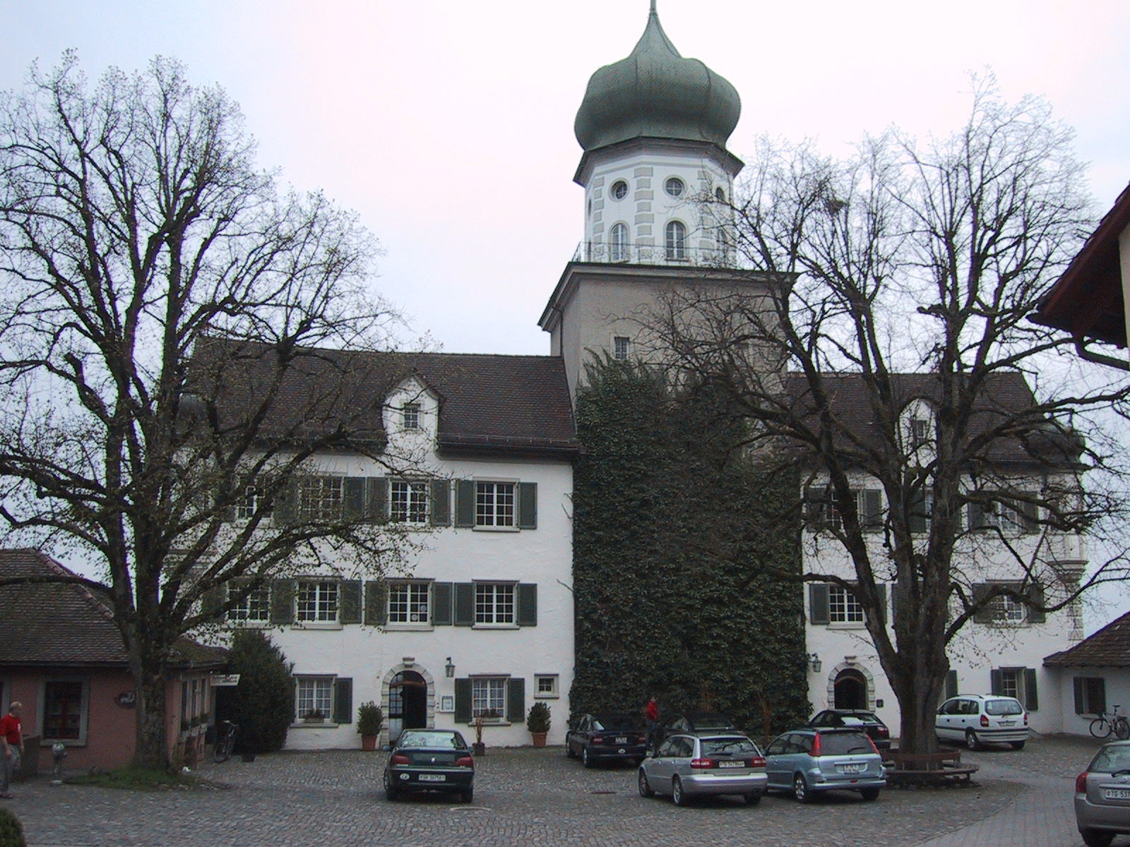 Schloss Herdern TG